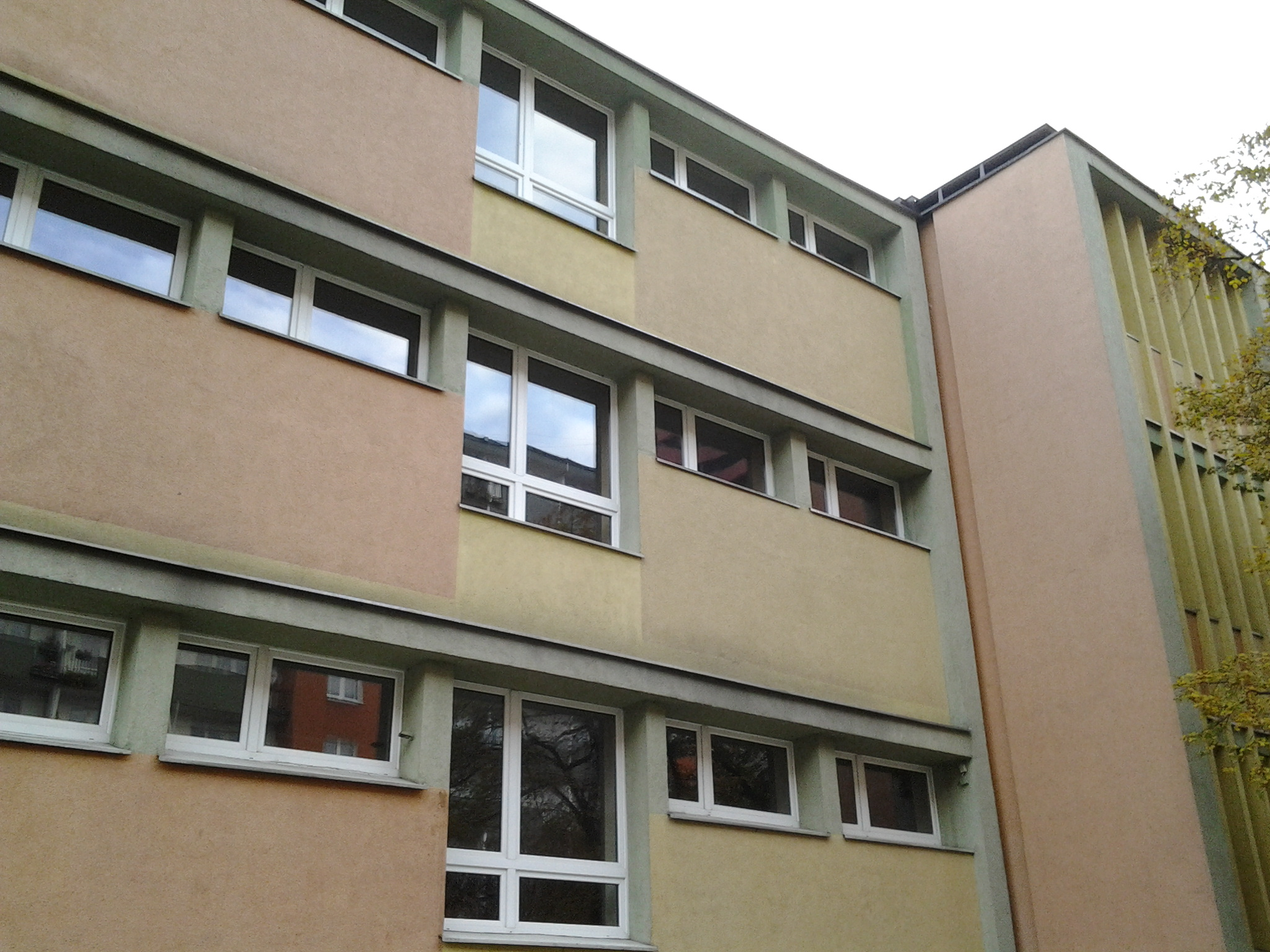 Szkoła przy ul. Powstańców Wlkp. Poznań.